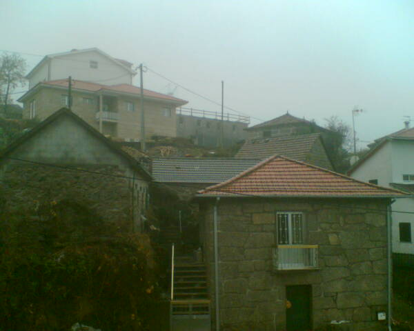 Foto do Lugar de Vila Boa - freguesia do Rego, concelho de Celorico de Basto